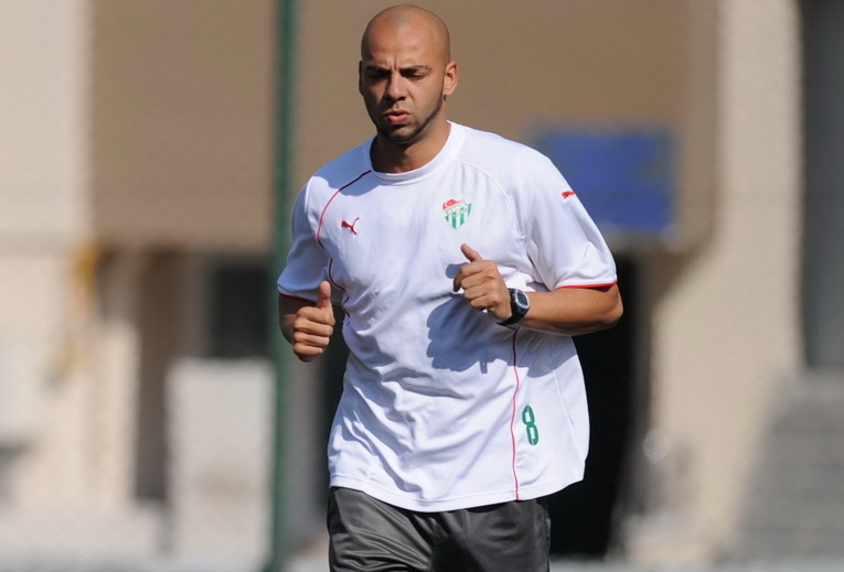 Giani Kirita la antrenament